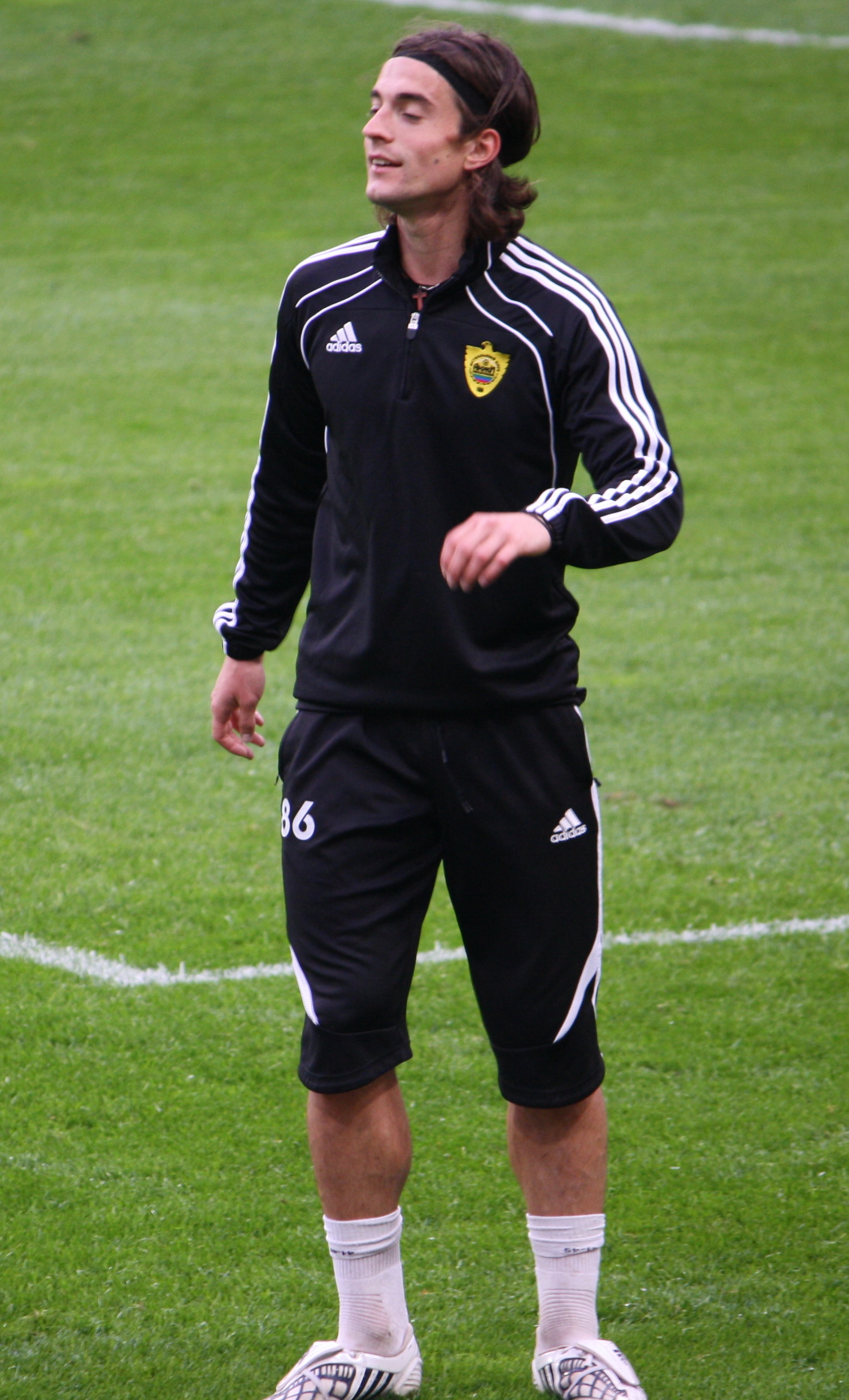 Todor Timonov